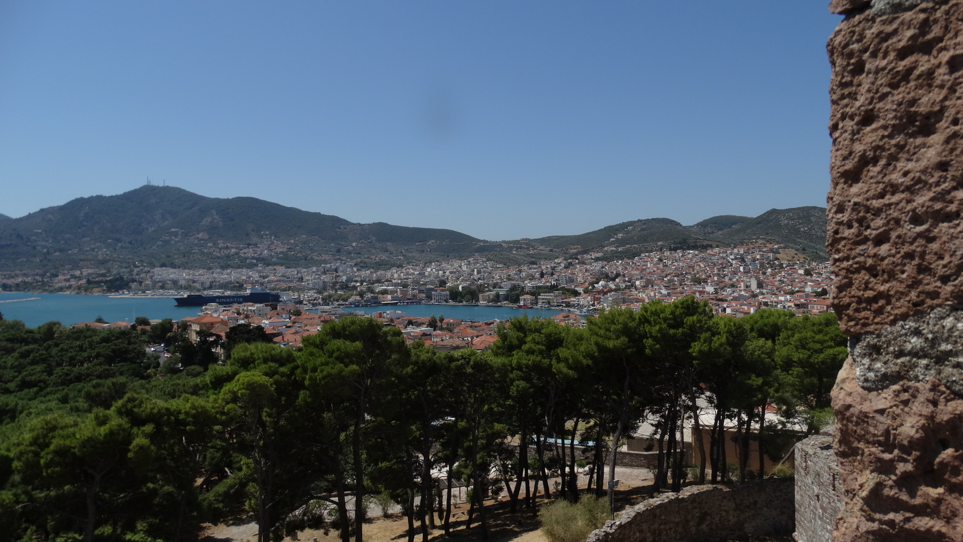 Κάστρο Μυτιλήνης«Κάστρο Μυτιλήνης»